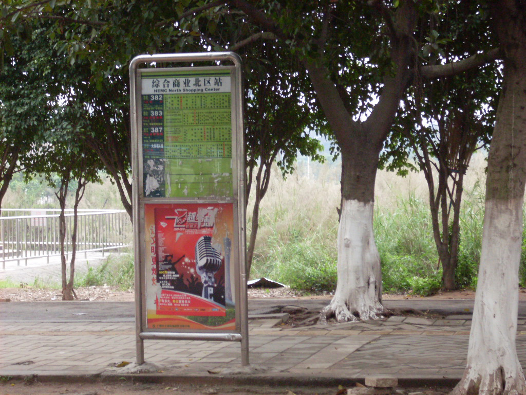 綜合商業北區站